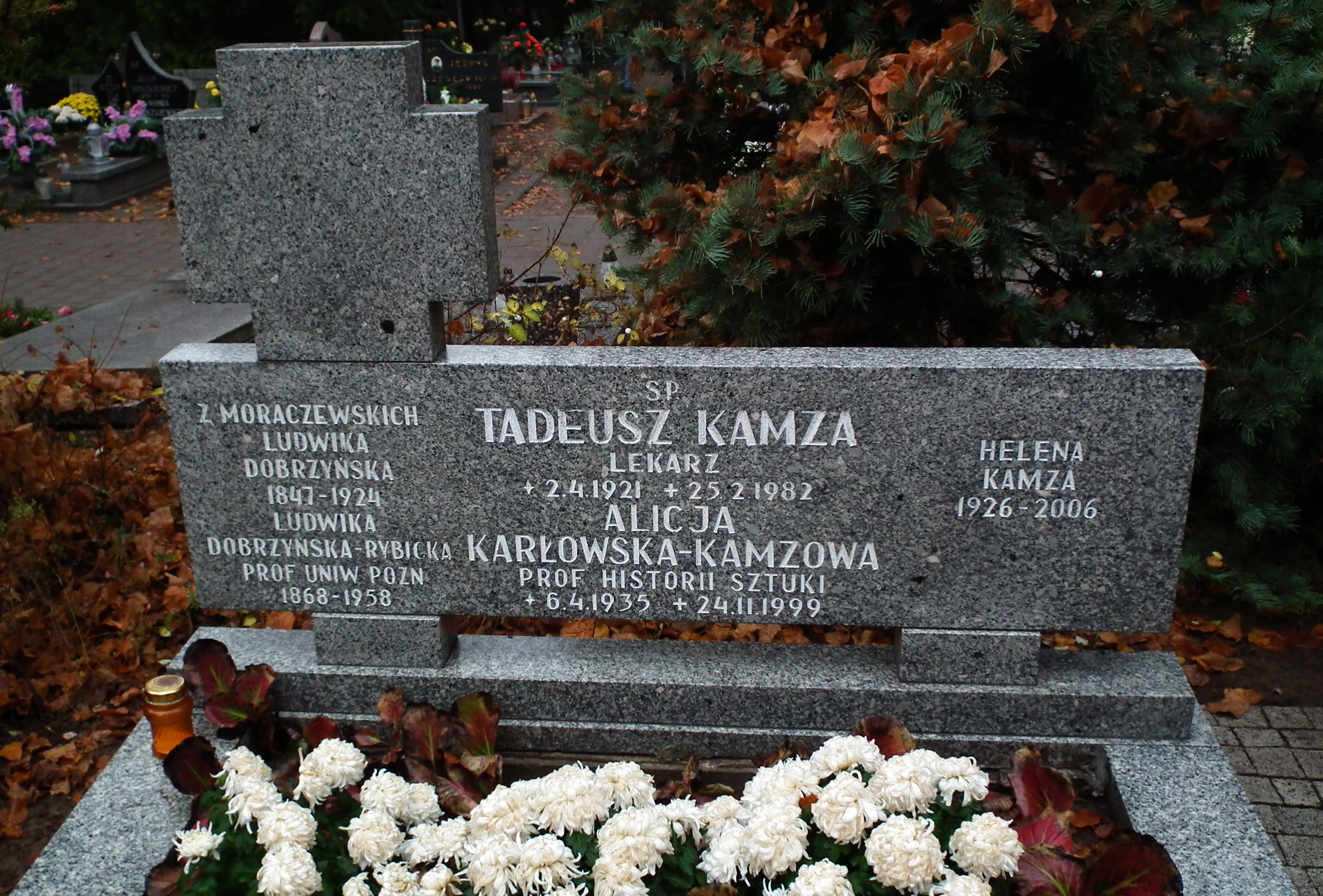 Cm. przy ul. Szczawnickiej w Poznaniu.